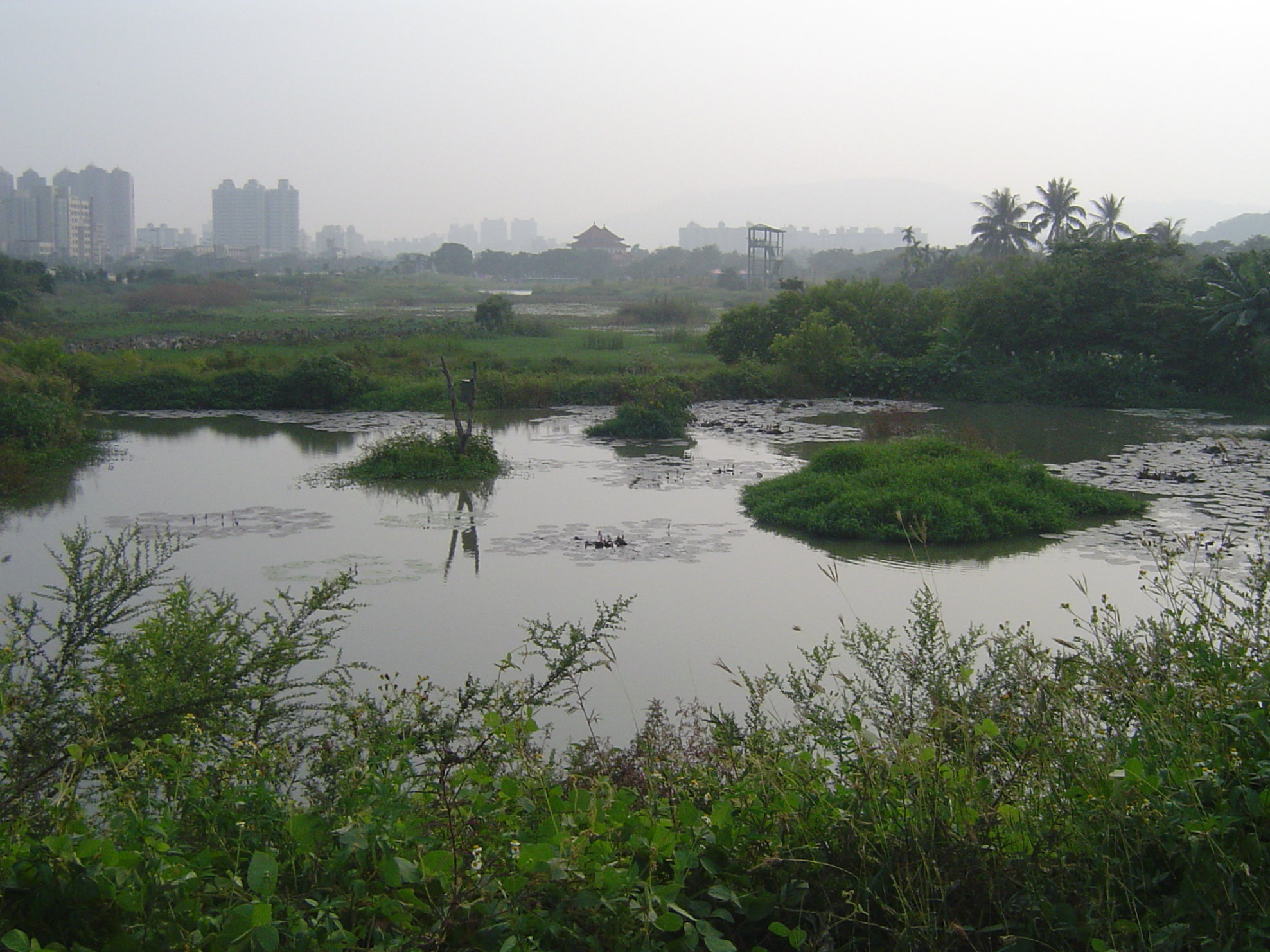 中文（台灣）: 高雄市左營區洲仔溼地一景。